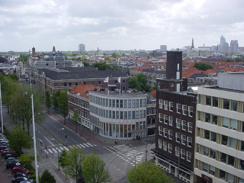 Foto van het kruispunt Laan van Meerdervoort en de Zoutmanstraat in Den Haag. Genomen vanuit het "torentje" van het Gymnasium Haganum. Vrijgegeven onder de GFDL. Bron: . Voor meer info over vrijgeving, zie kloeg.txt in de kluis. Camera position 52°5′2.2″N 4°17′29.5″E / 52.083944°N 4.291528°E looking direction NE.